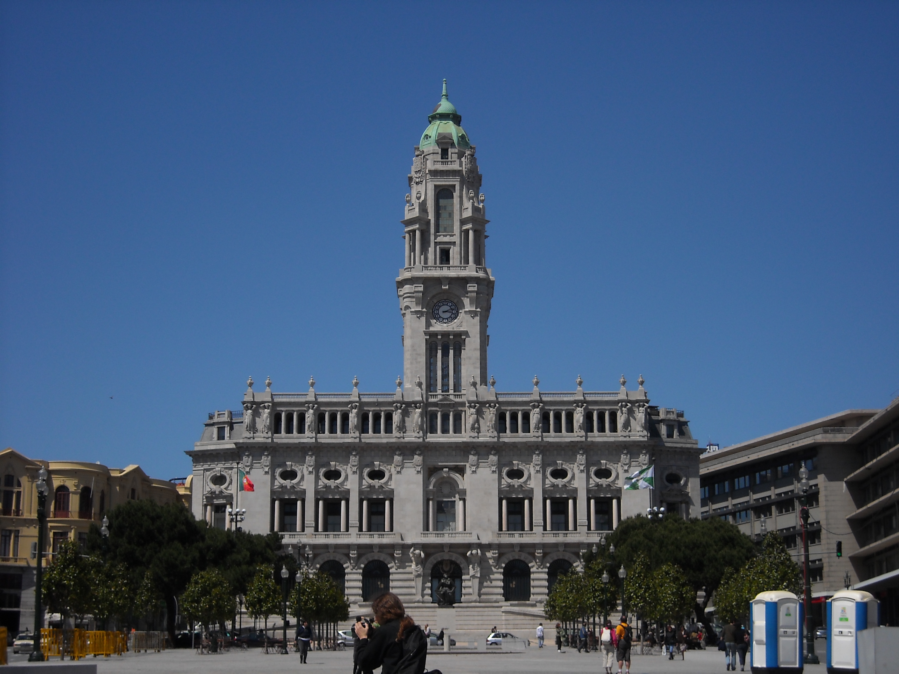 Edifício da Câmara Municipal do Porto, situada na Avenida dos Aliados, na cidade do Porto, em Portugal.